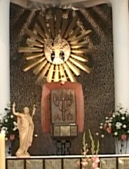 Widok na tabernakulum w kościele pw. św. Cyryla i Metodego w Knurowie